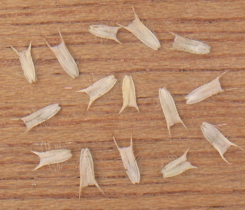 Timoteegras vruchten) Phleum pratense fruits (seeds